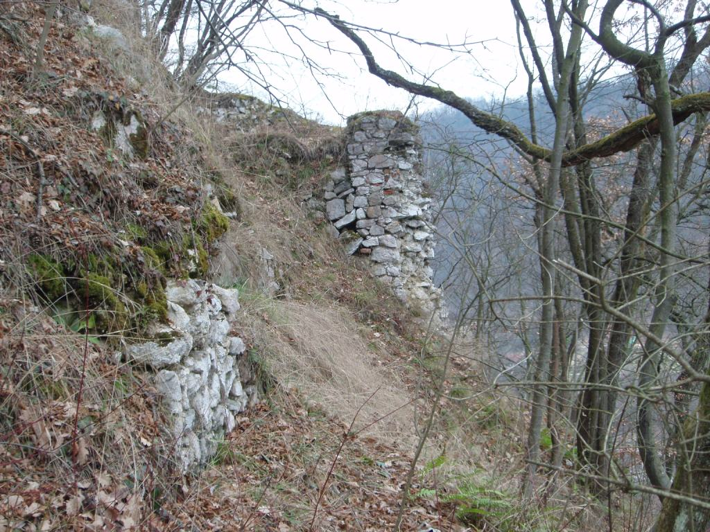 Ruins of Krško Castle (Slovenia)